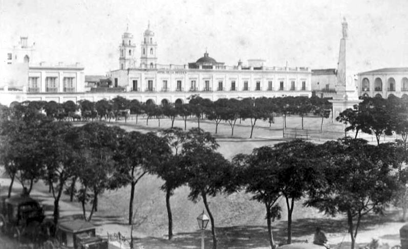 Imagen de la Plaza de Mayo, Buenos Aires, Argentina. En el fondo puede verse la Recova nueva.